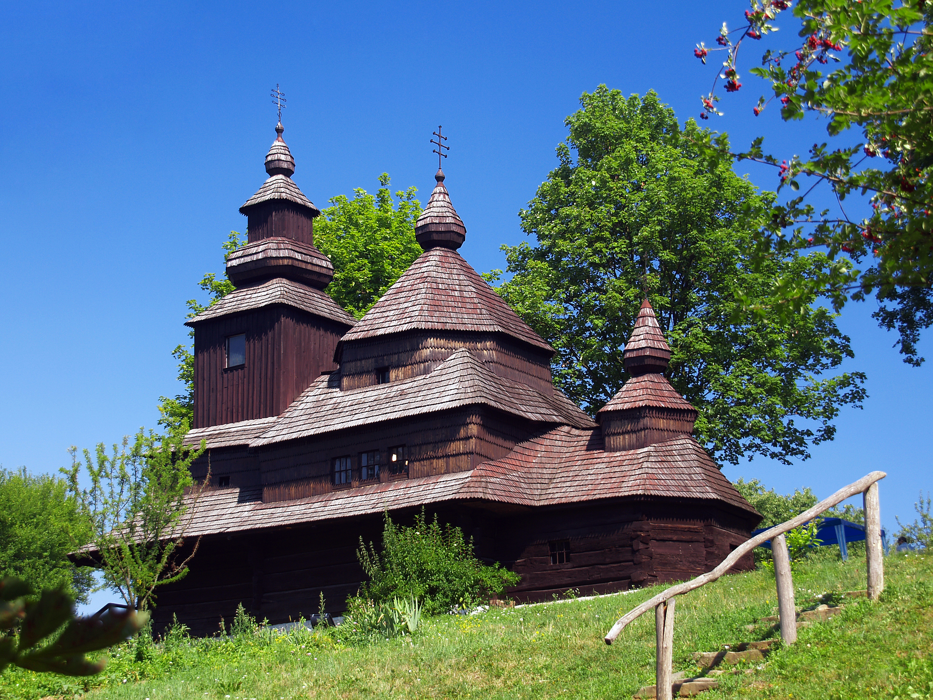 Humenné - Eglise de l’archange Saint-Michel du Vihorlatské múzeum